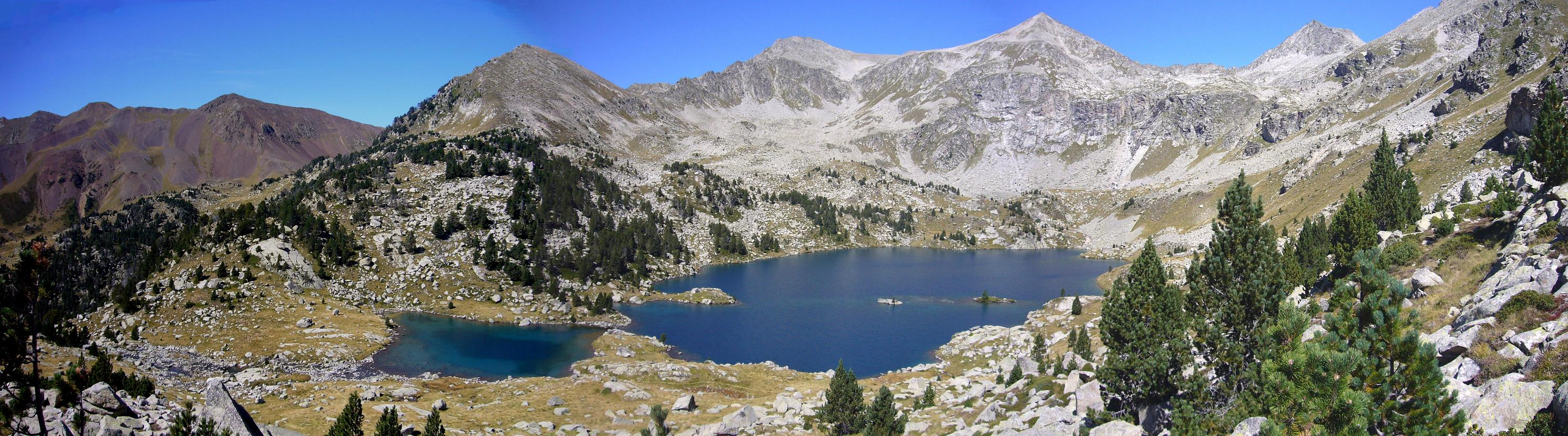 Estany Gémena de Baix vist des del sud-est; la Vall de Boí, Alta Ribagorça, Catalunya